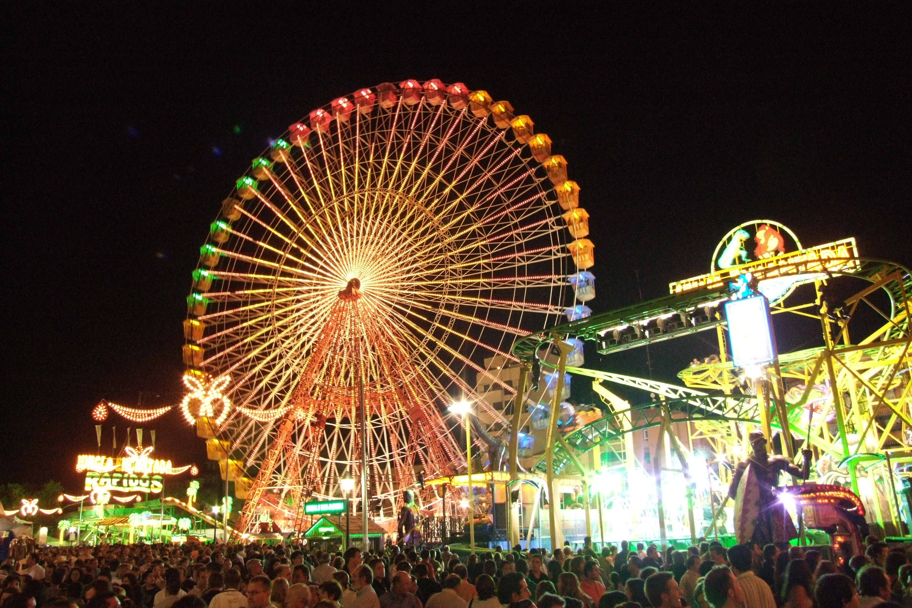 Zona de atracciones de la Feria de Albacete